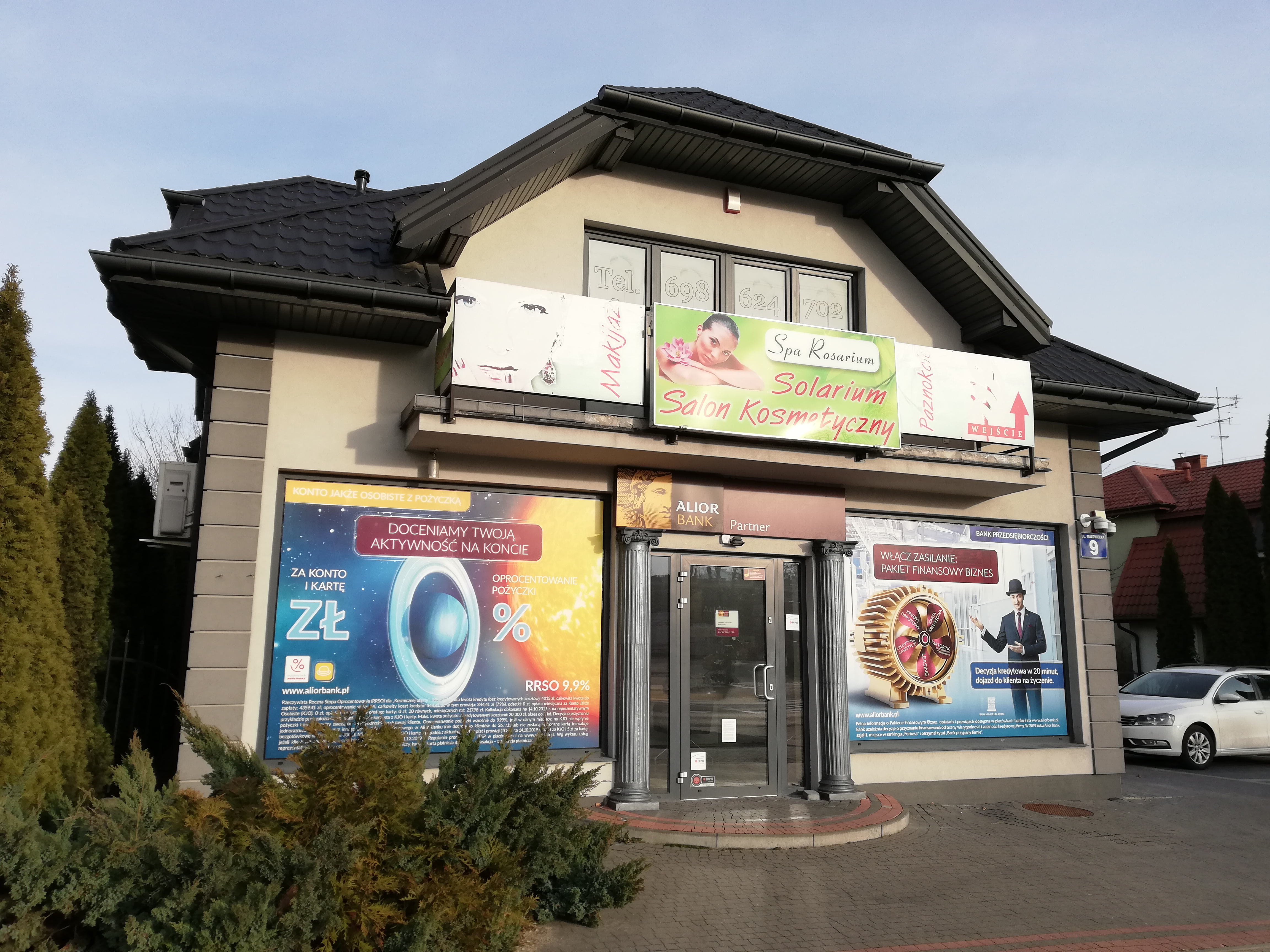 Zambrovo domo kun kolumnetoj